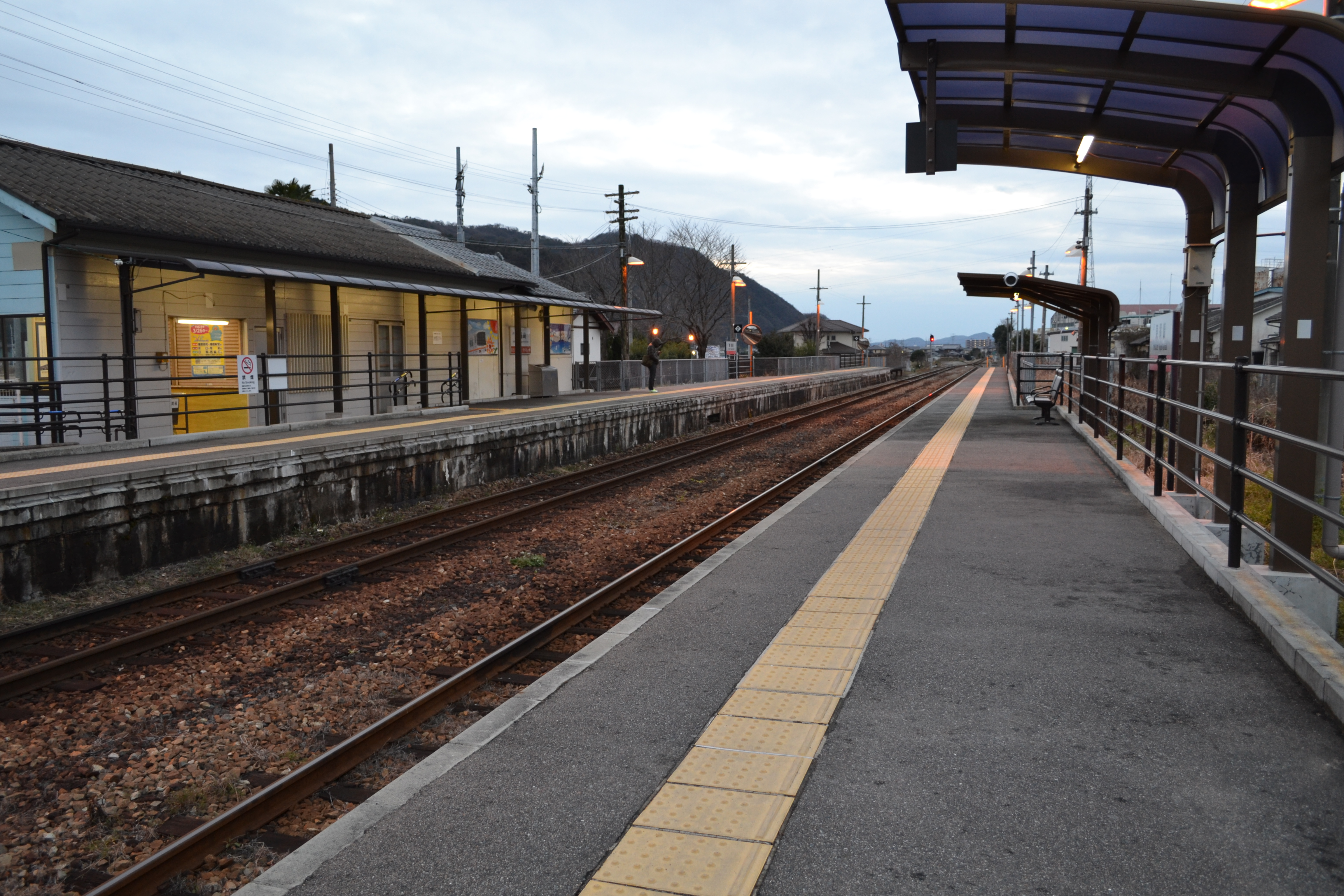 東觜崎駅とその周辺